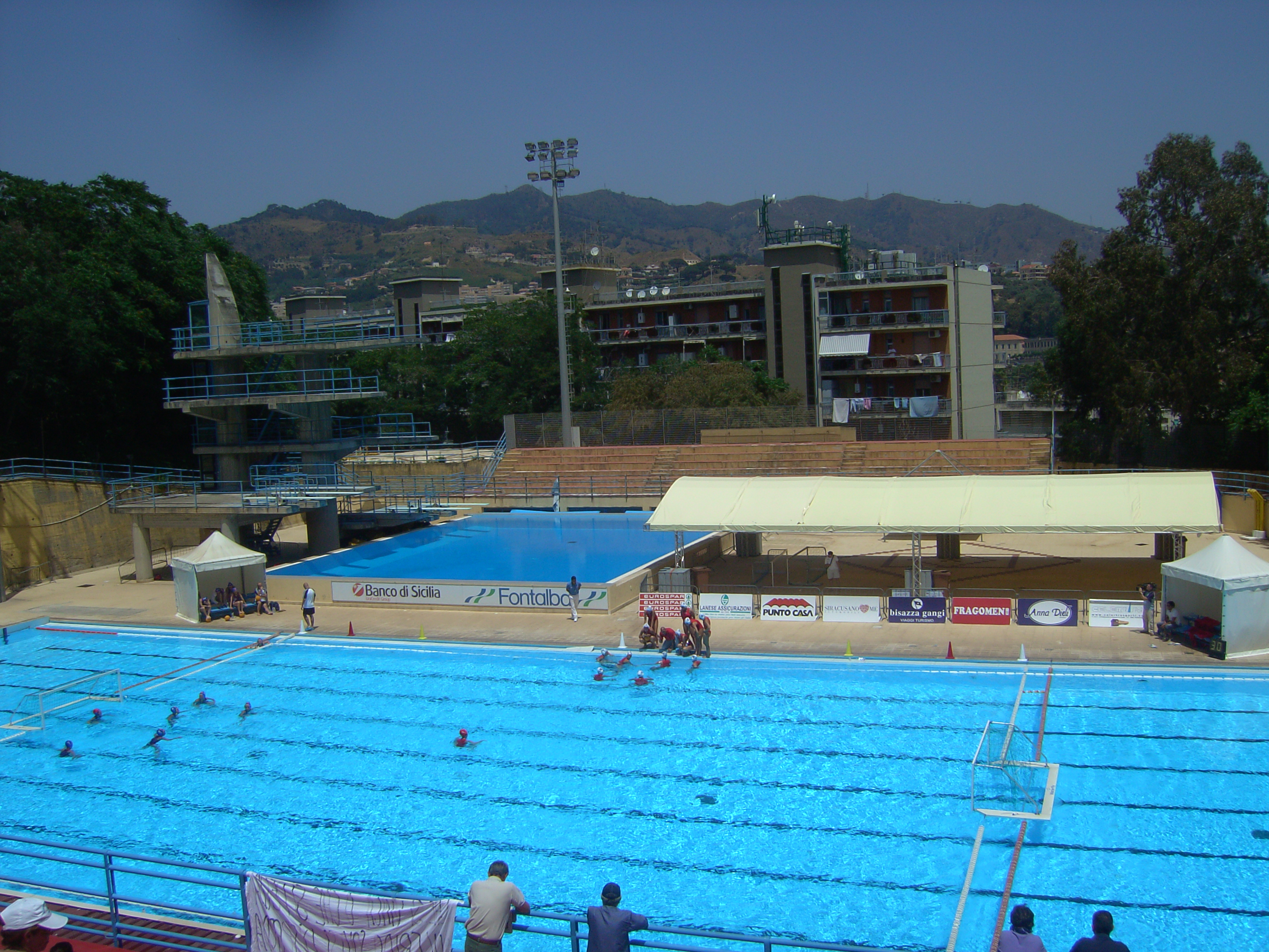 Piscina scoperta del Cappuccini e in lontananza piscina per i tuffi